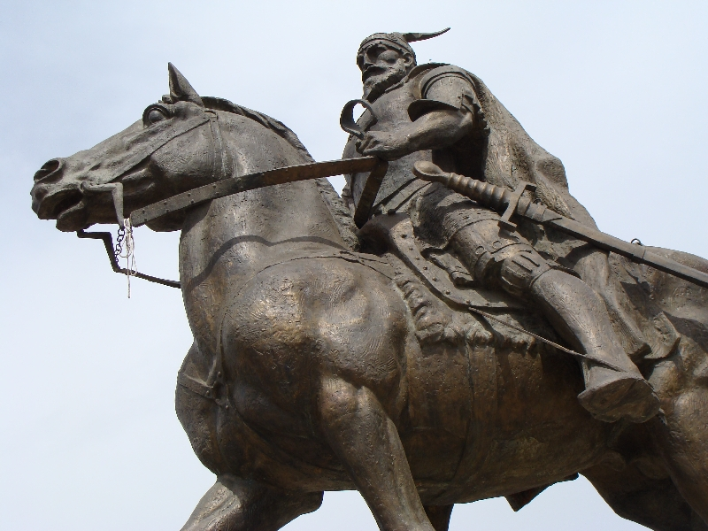 Skanderbeg Monument, Skopje,Macedonia